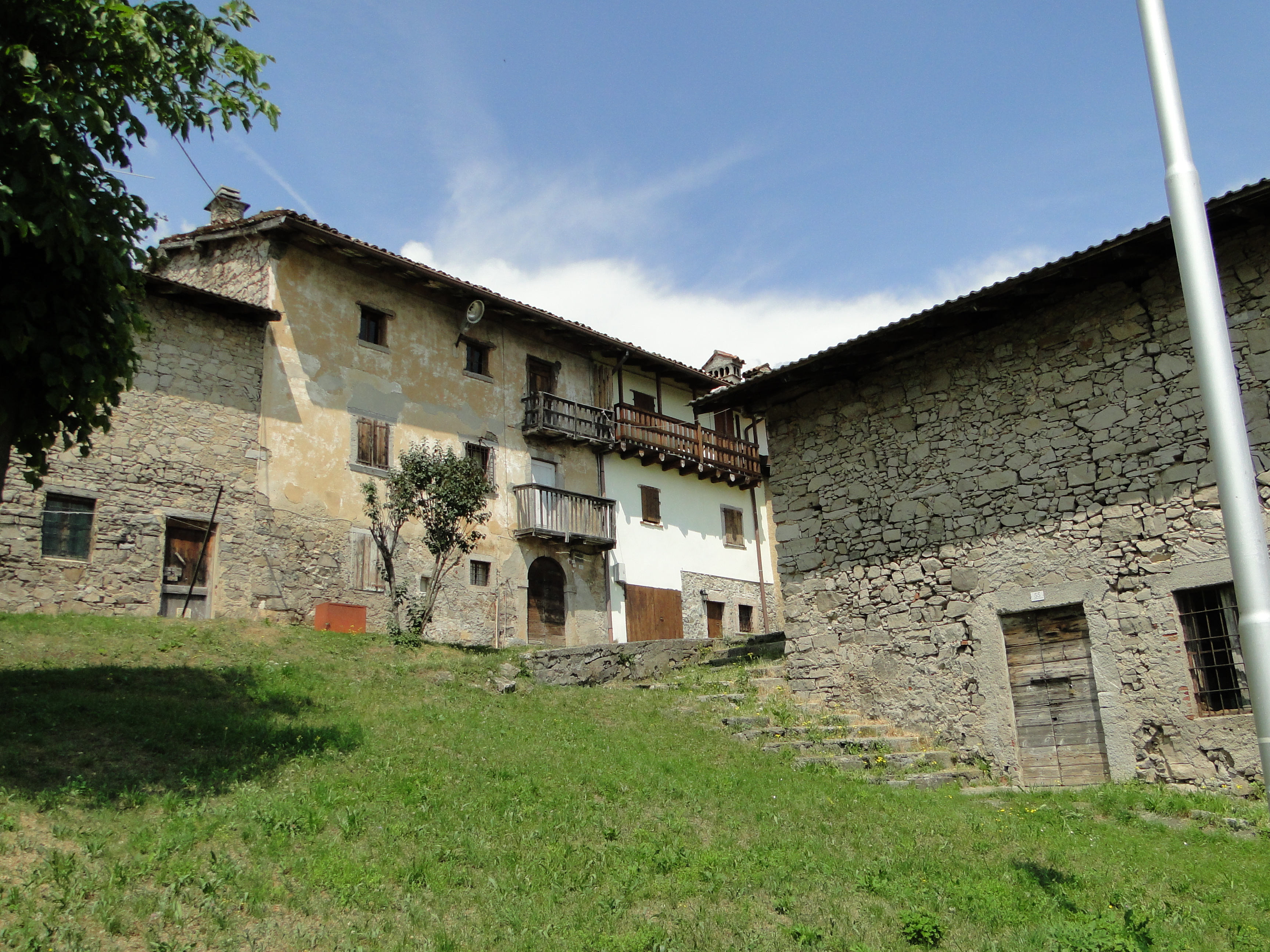 Amora, fraz. di Aviatico (BG). Rustico